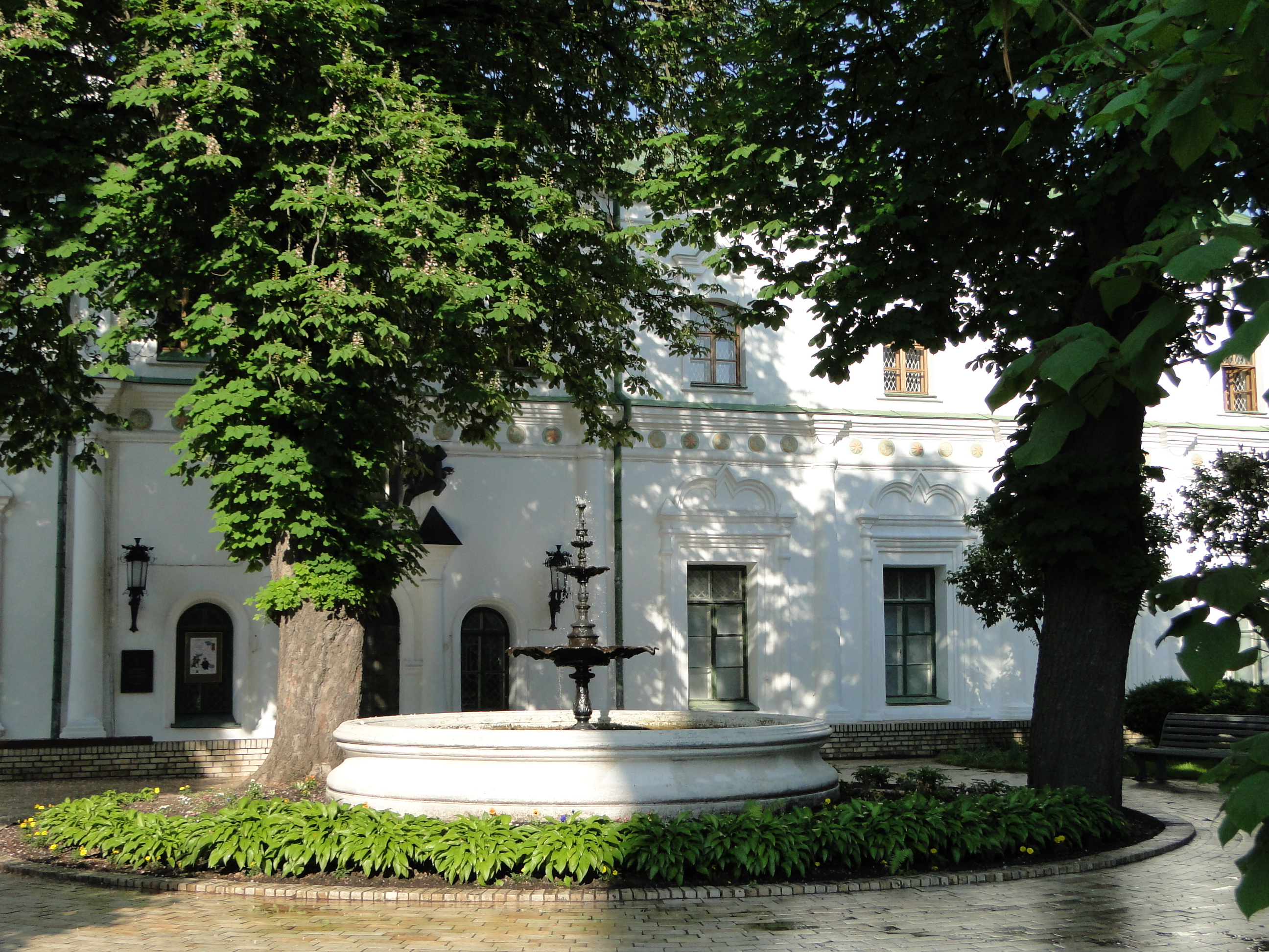 Киево-Печерская Лавра. Фонтан